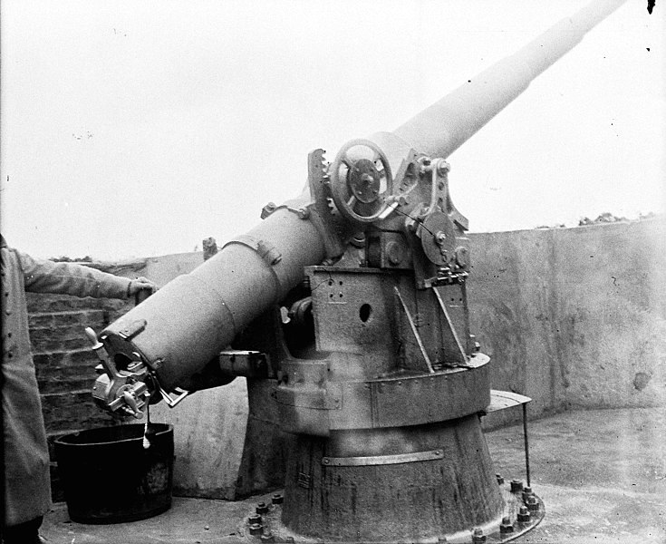 Pièce de 100 de marine à Saint-Idesbalde, province des Flandres Occidentales, région Flamande (Belgique) . 1918. Guerre 1914-1918.